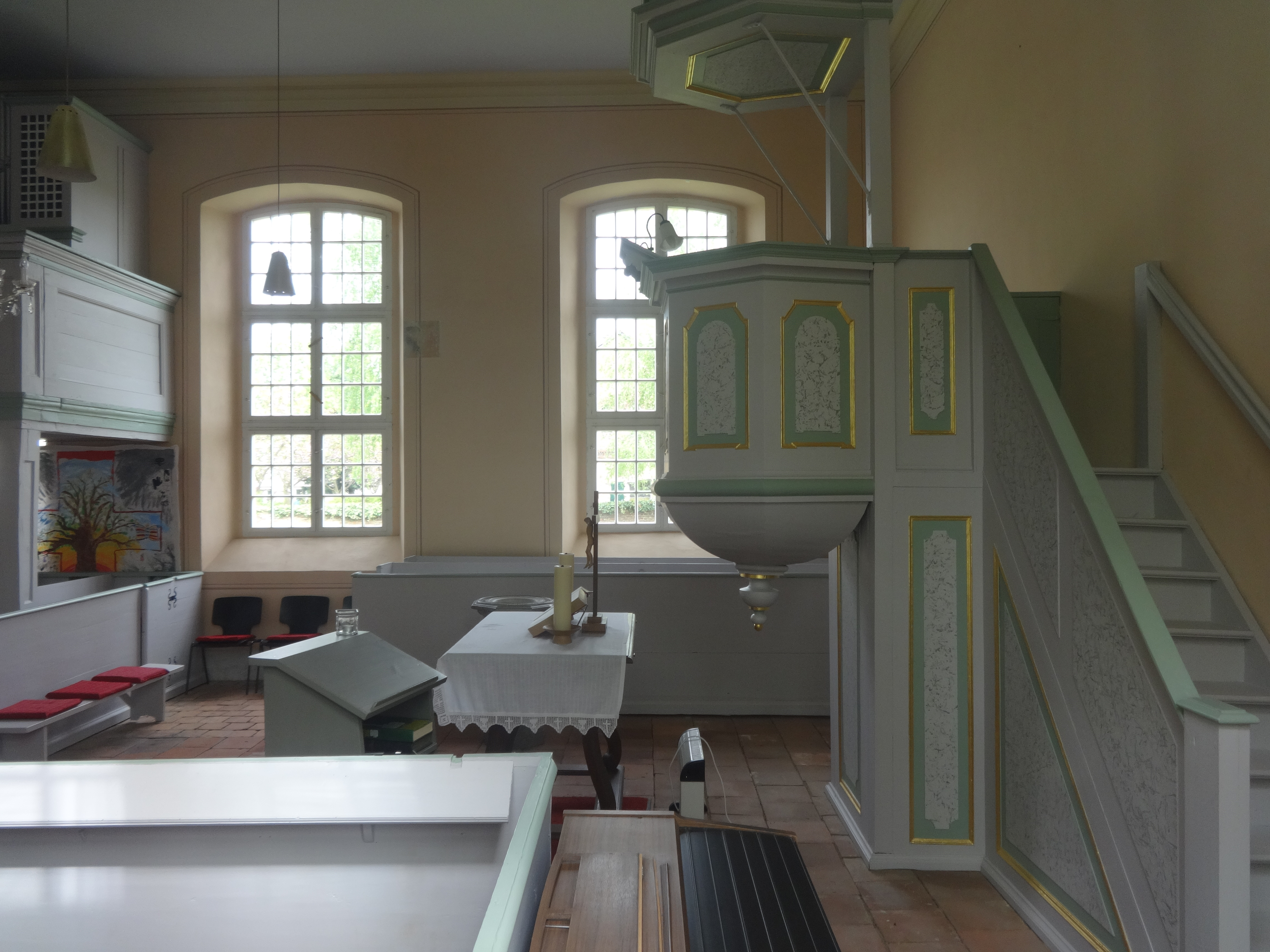 Dorfkirche Nudow, eine der wenigen Kronkirchen in Brandenburg aus dem 18. Jahrhundert. Gemeinde Nuthetal, Landkreis Potsdam-Mittelmark.